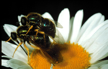 Kriebelmücke